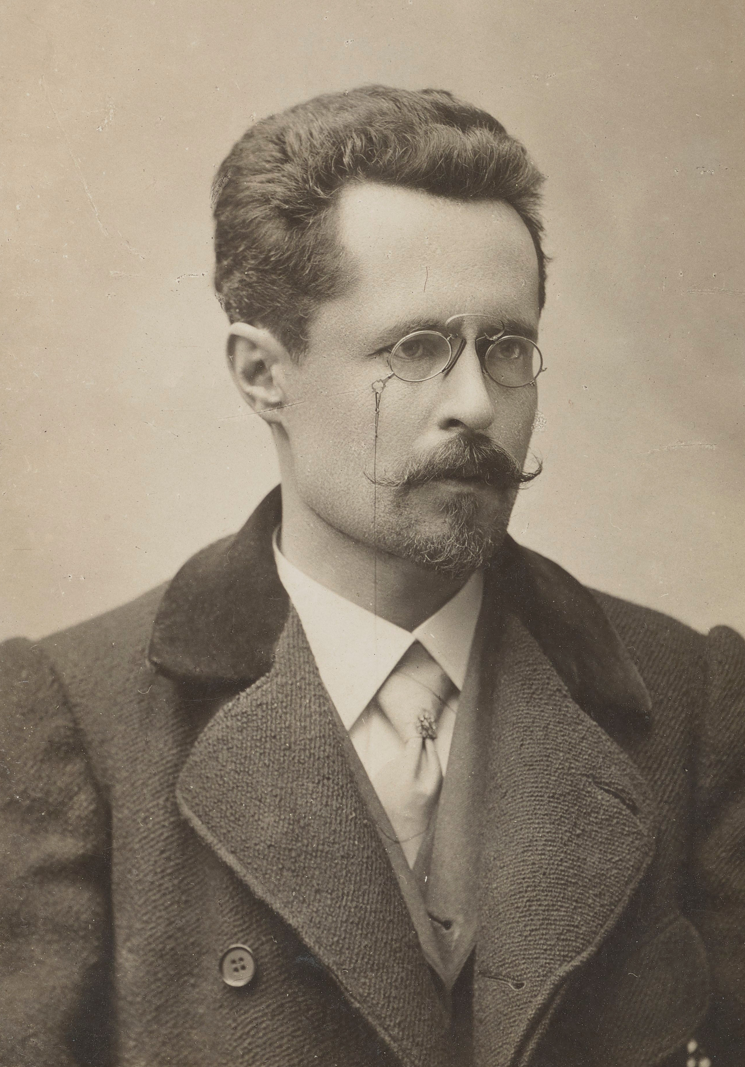 Władysław Spasowski